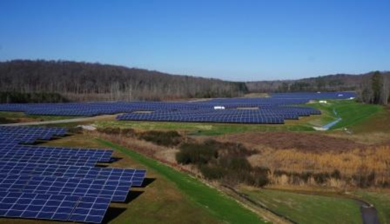 Volkswagen Chattanooga, Tennessee, USA (9,5 MWp) Referenzprojekt Phoenix Solar AG, Sulzemoos